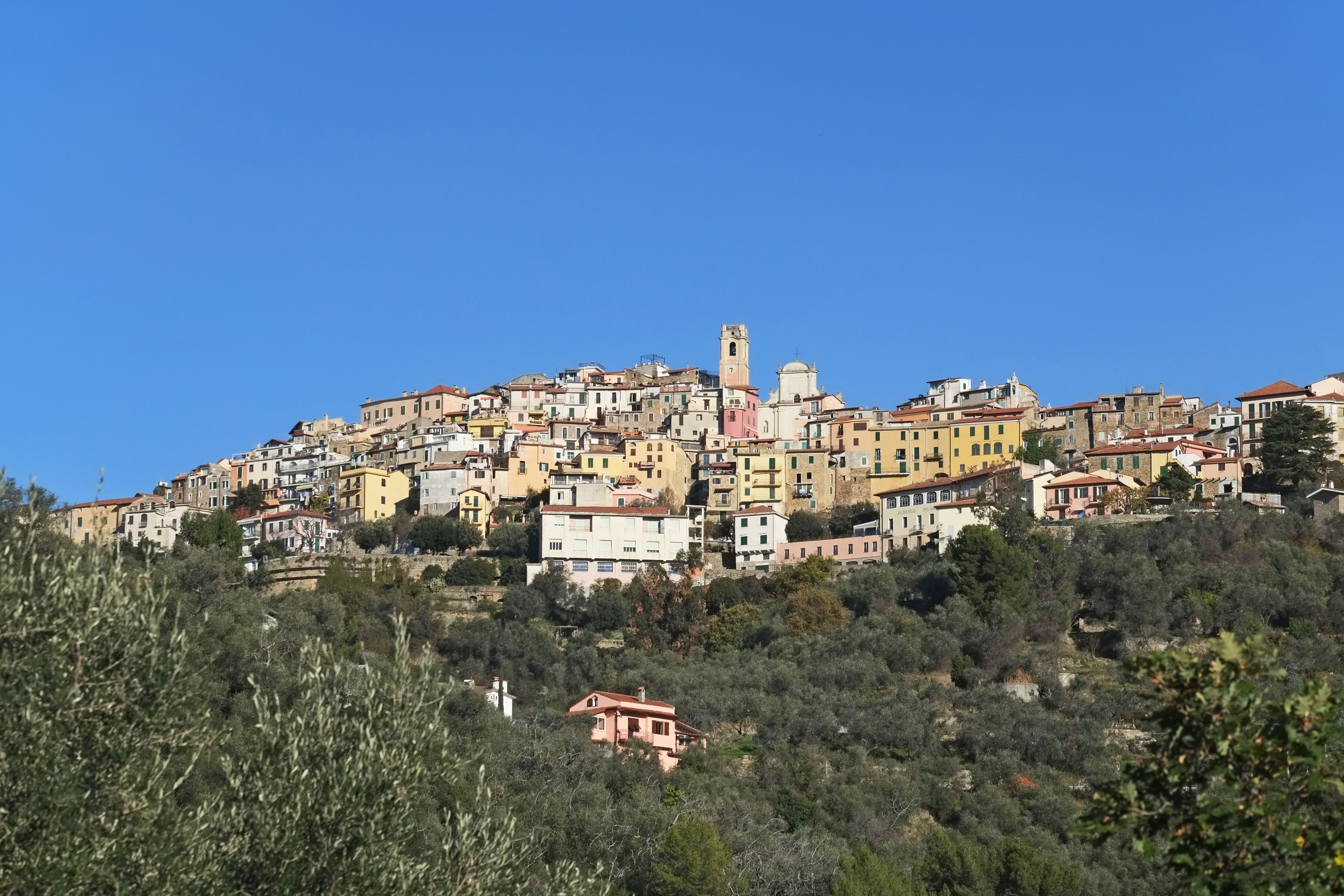 Le village de Perinaldo en automne.